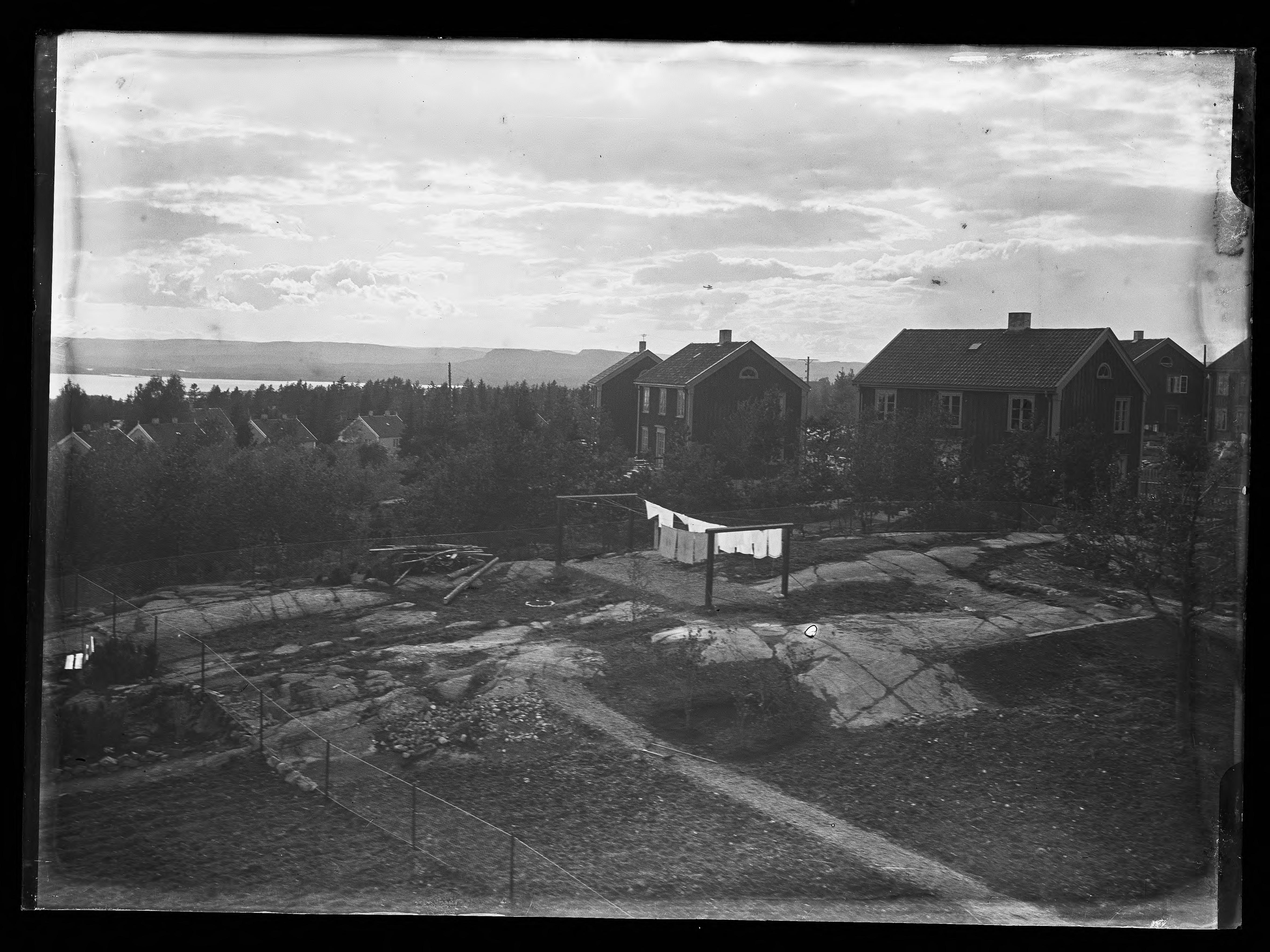 Bildet er hentet fra Nasjonalbibliotekets bildesamling. Anmerkninger til bildet var: Påskrift arkivark: Holtet Haveby, Bygge - Bo Arkivnummer: 573